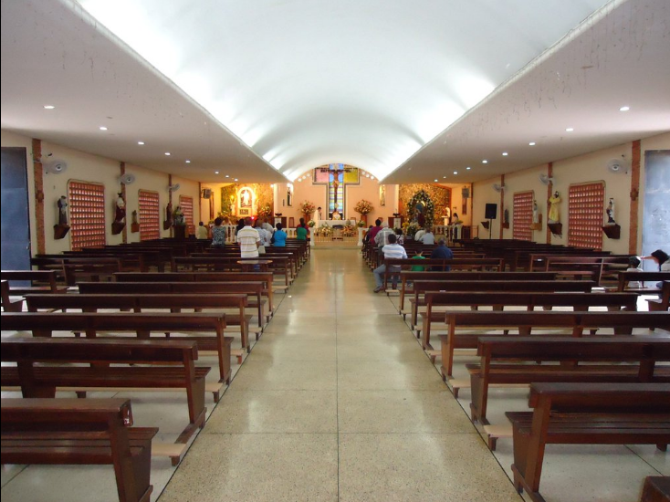 Iglesia católica Santo Domingo Savio Urbanización Carlos Delgado Chalbaud, Caracas, Venezuela